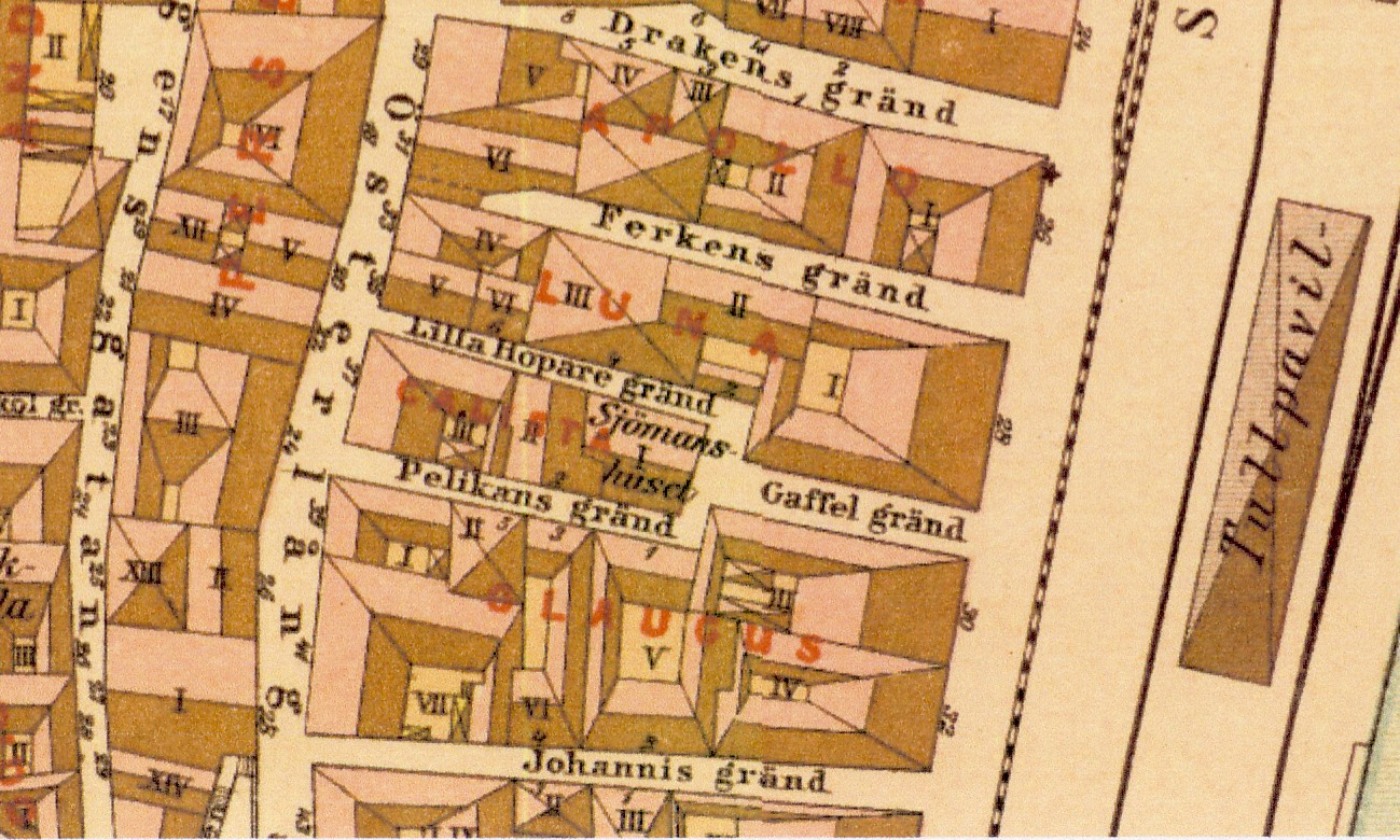 Gamla stan: kvarteren Apollo, Luna, Callisto, Glaucus